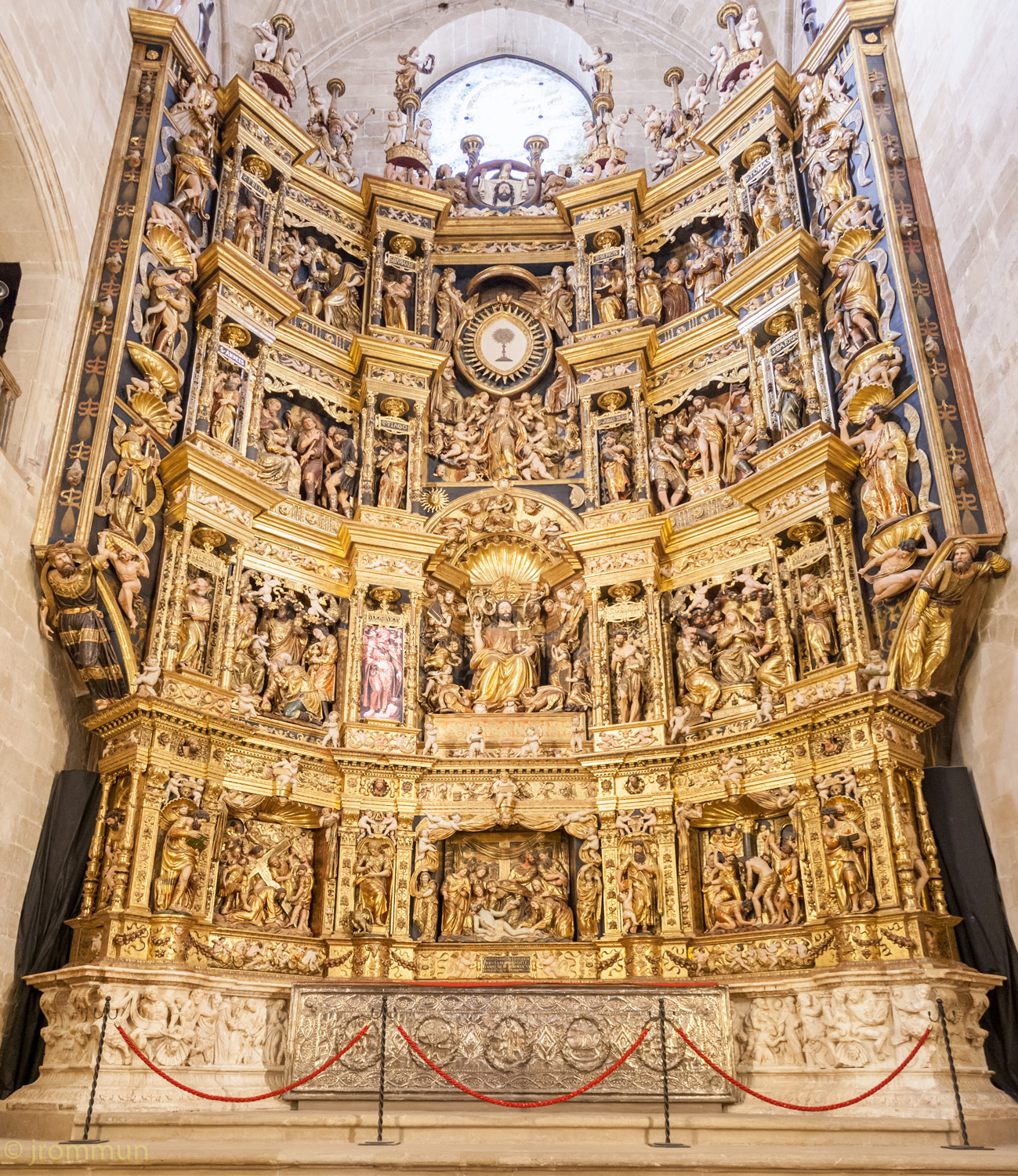 Retablo Mayor de la Catedral de Santo Domingo de la Calzada. La Rioja. España.